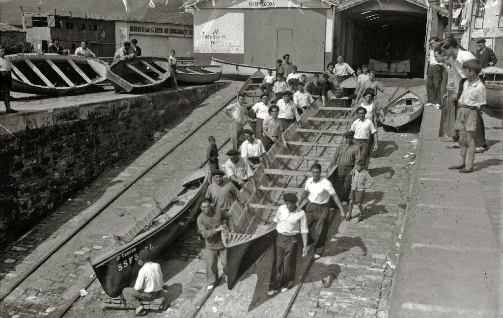 Título original: Regatas de traineras en la bahía de la Concha (78/127) Localización: San Sebastián (Guipúzcoa)